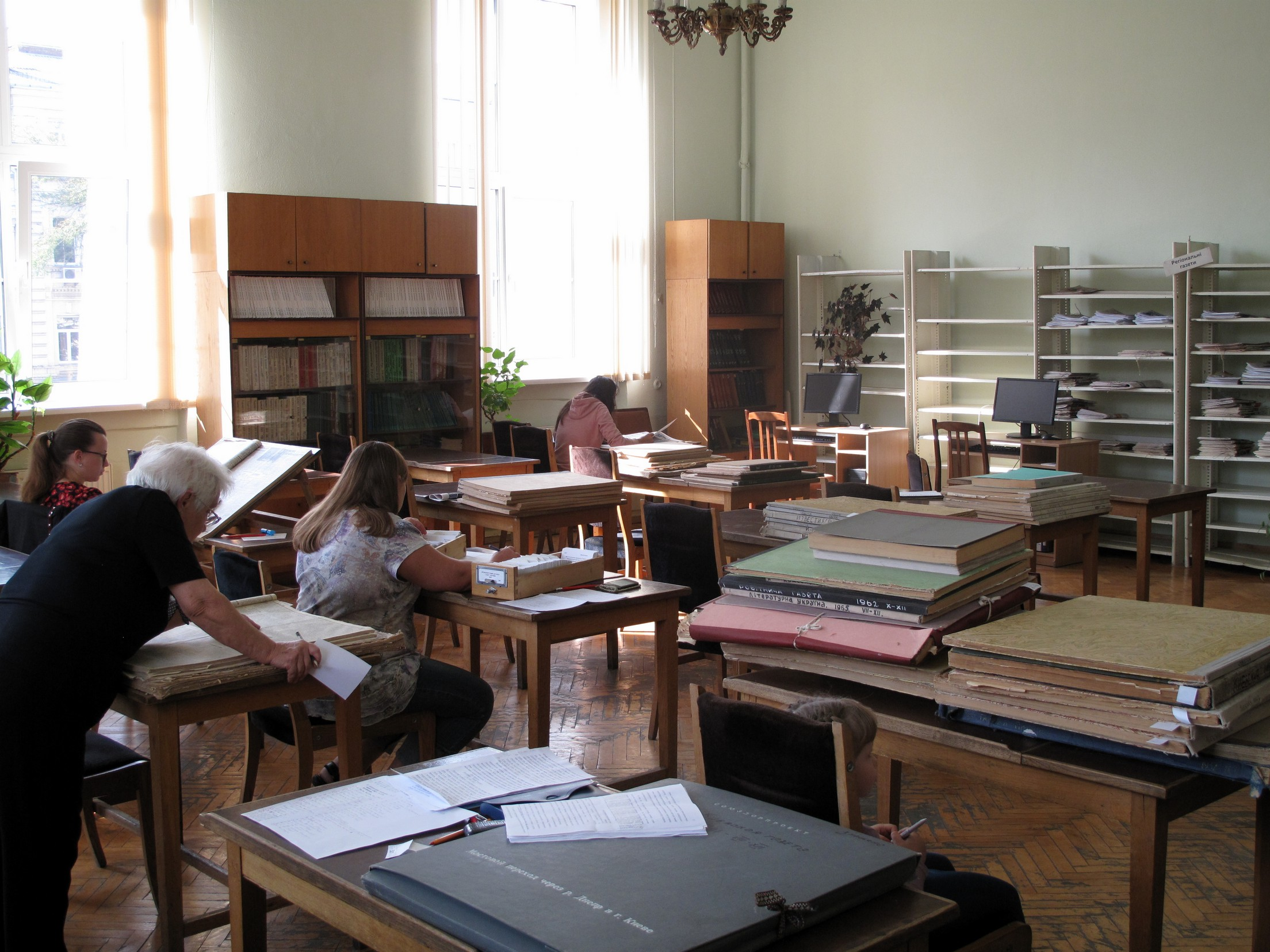 Читальна зала періодики